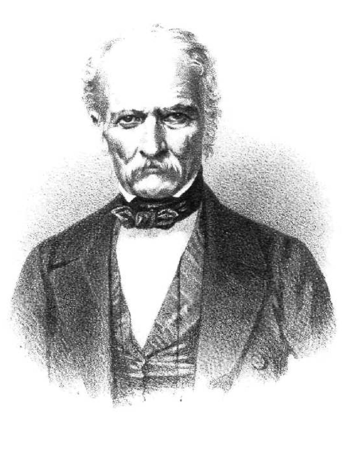 Griechischer Freiheitskämpfer, 19. Jahrhundert